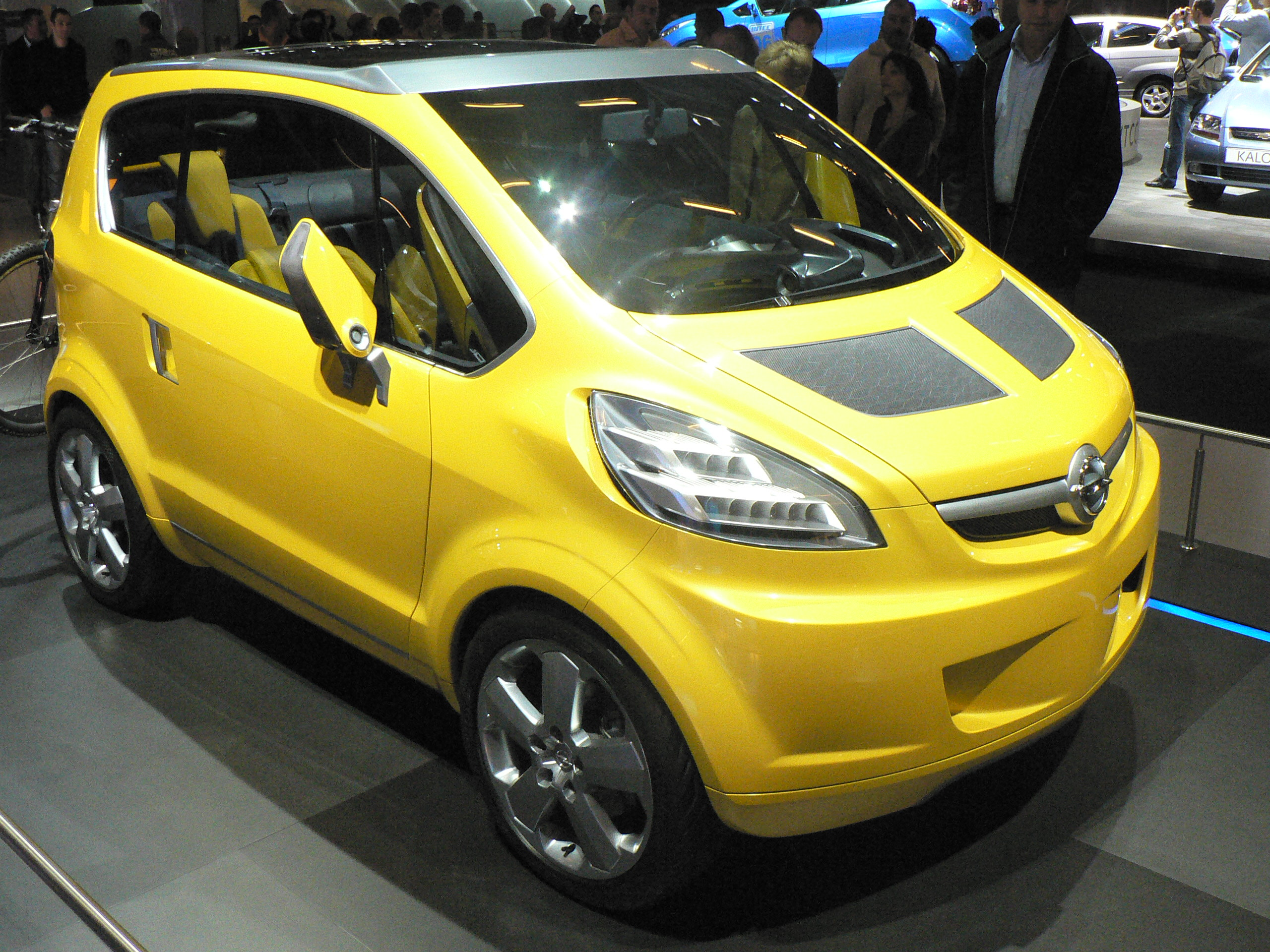 Description: Mondial de l'automobile de Paris (October 2006)